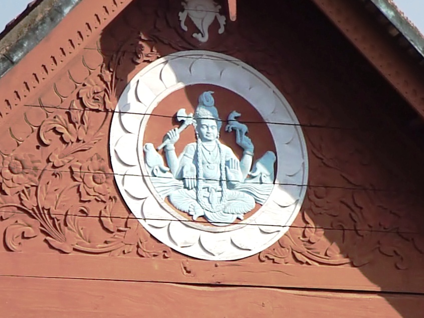 വാഴപ്പള്ളിതേവർ-കിഴക്കേ ആനക്കൊട്ടിലിലെ ദാരുനിർമ്മിത ശില്പം:തിരുവാഴപ്പള്ളിതേവർ